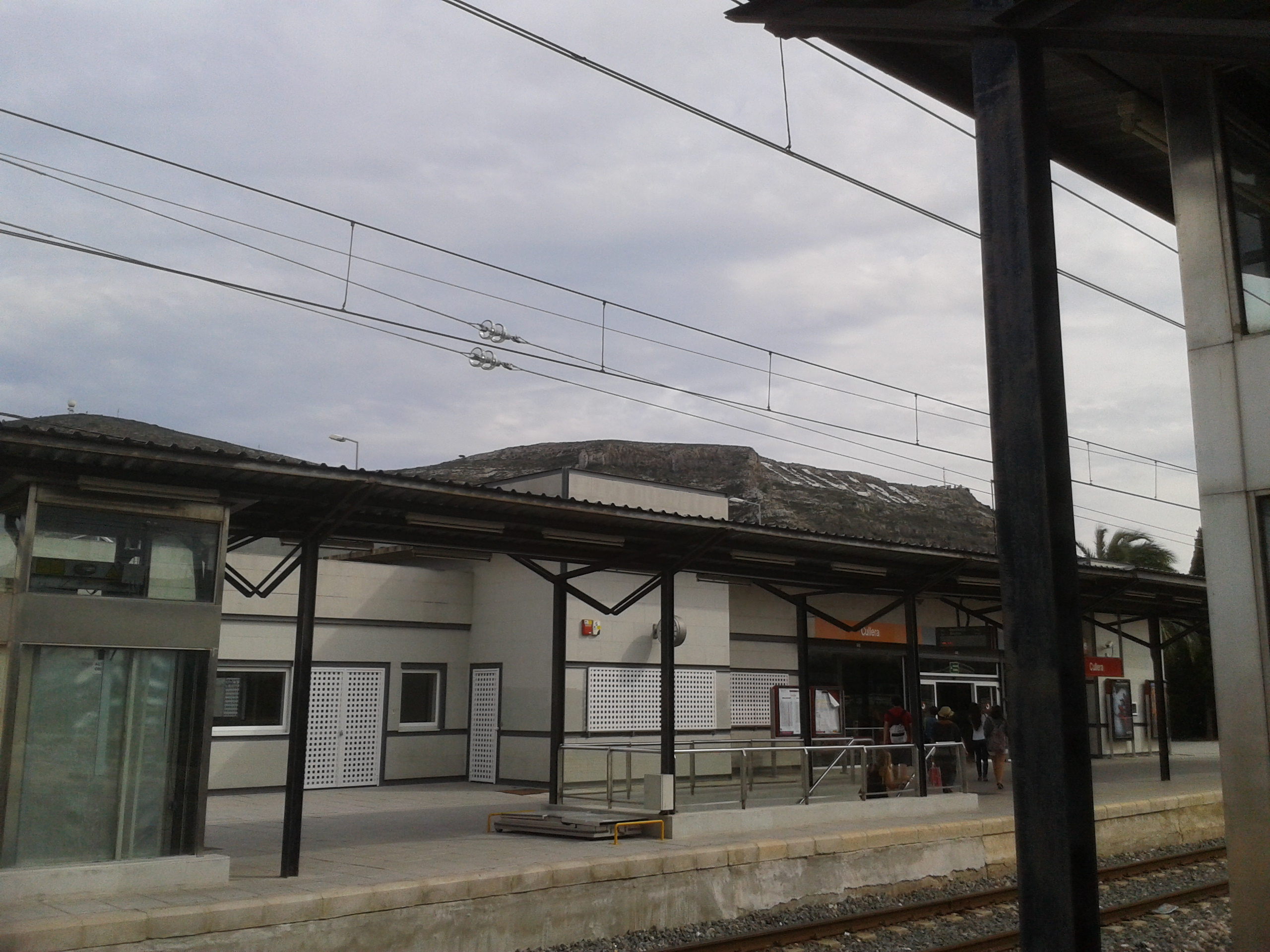 Estación de ferrocarril de Cullera